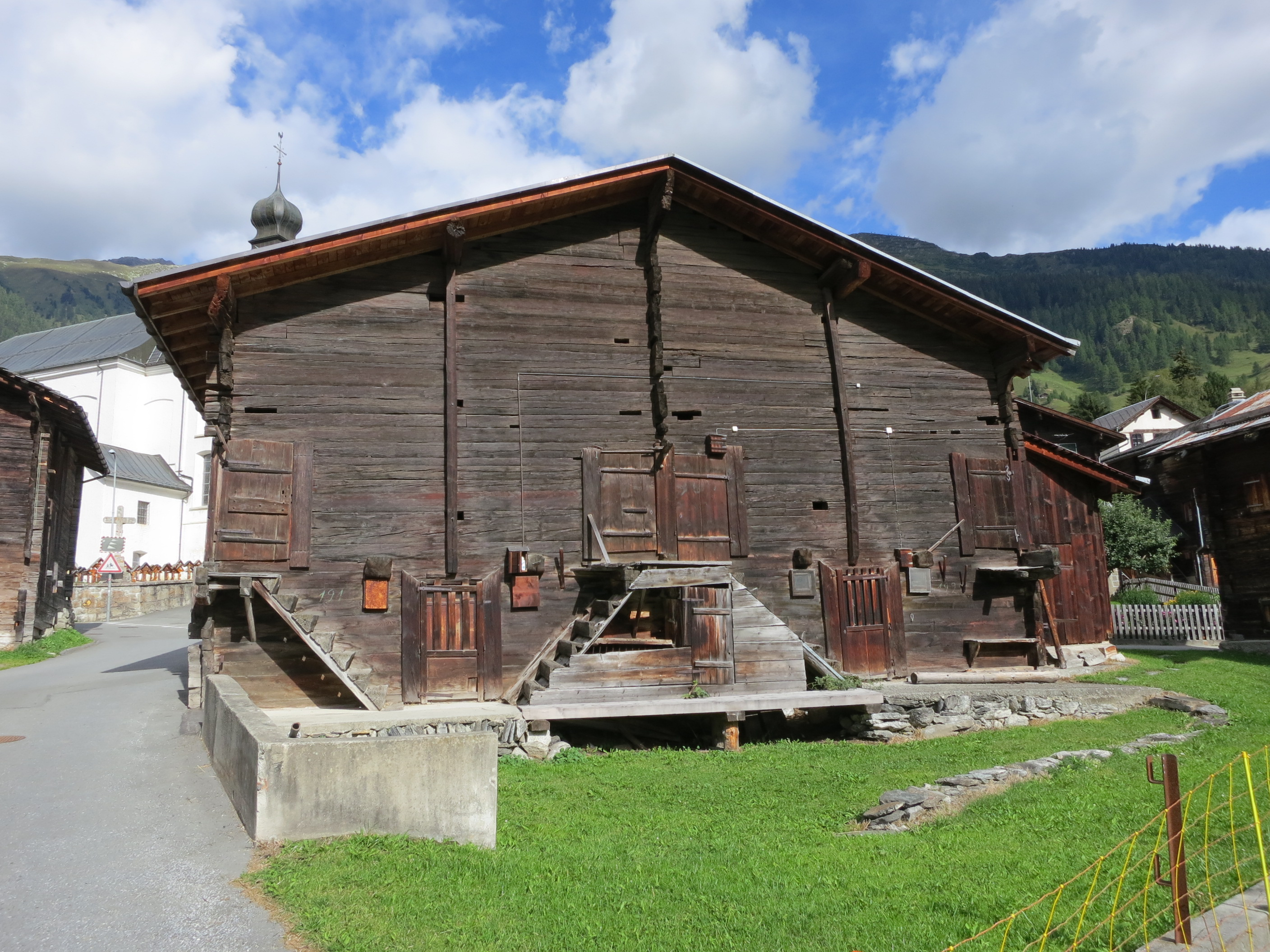 Stadel, Reckingen VS, Schweiz